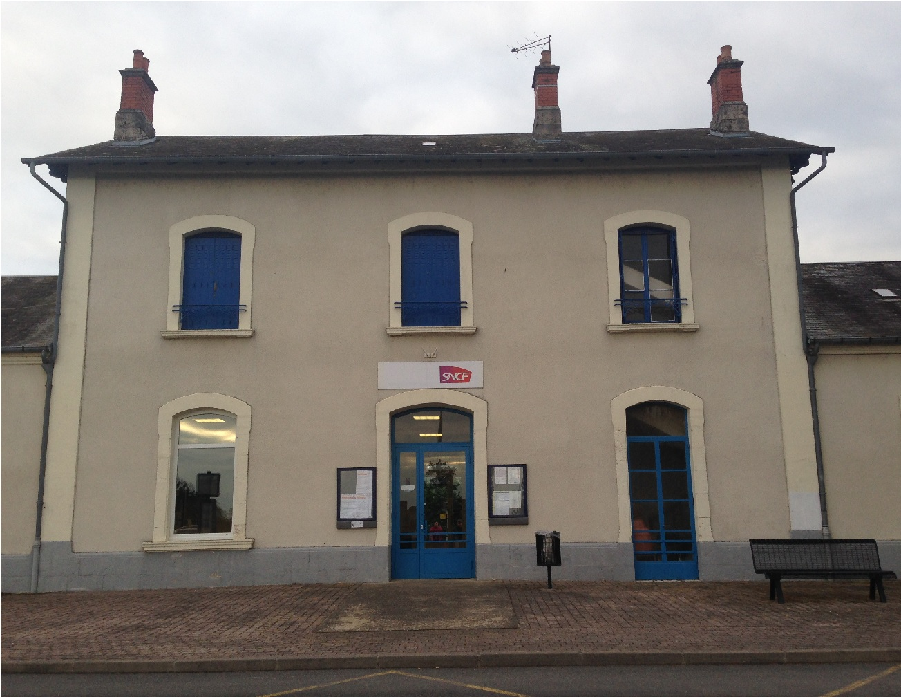 圣弗洛朗-谢尔站（Gare de Saint-Florent-sur-Cher）